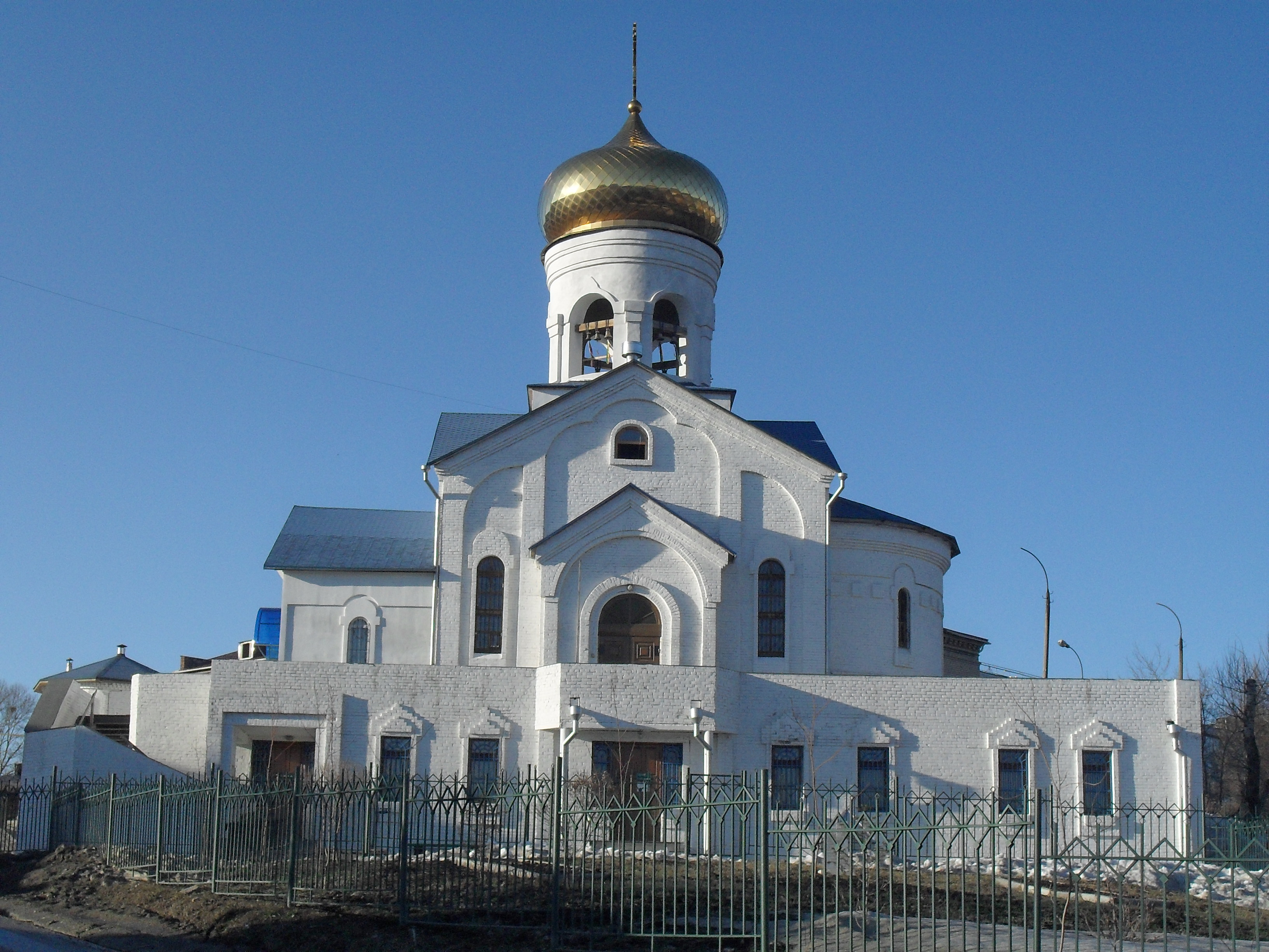 Храм во имя Святого праведного Симеона Верхотурского Чудолтворца. Вид с южной стороны.